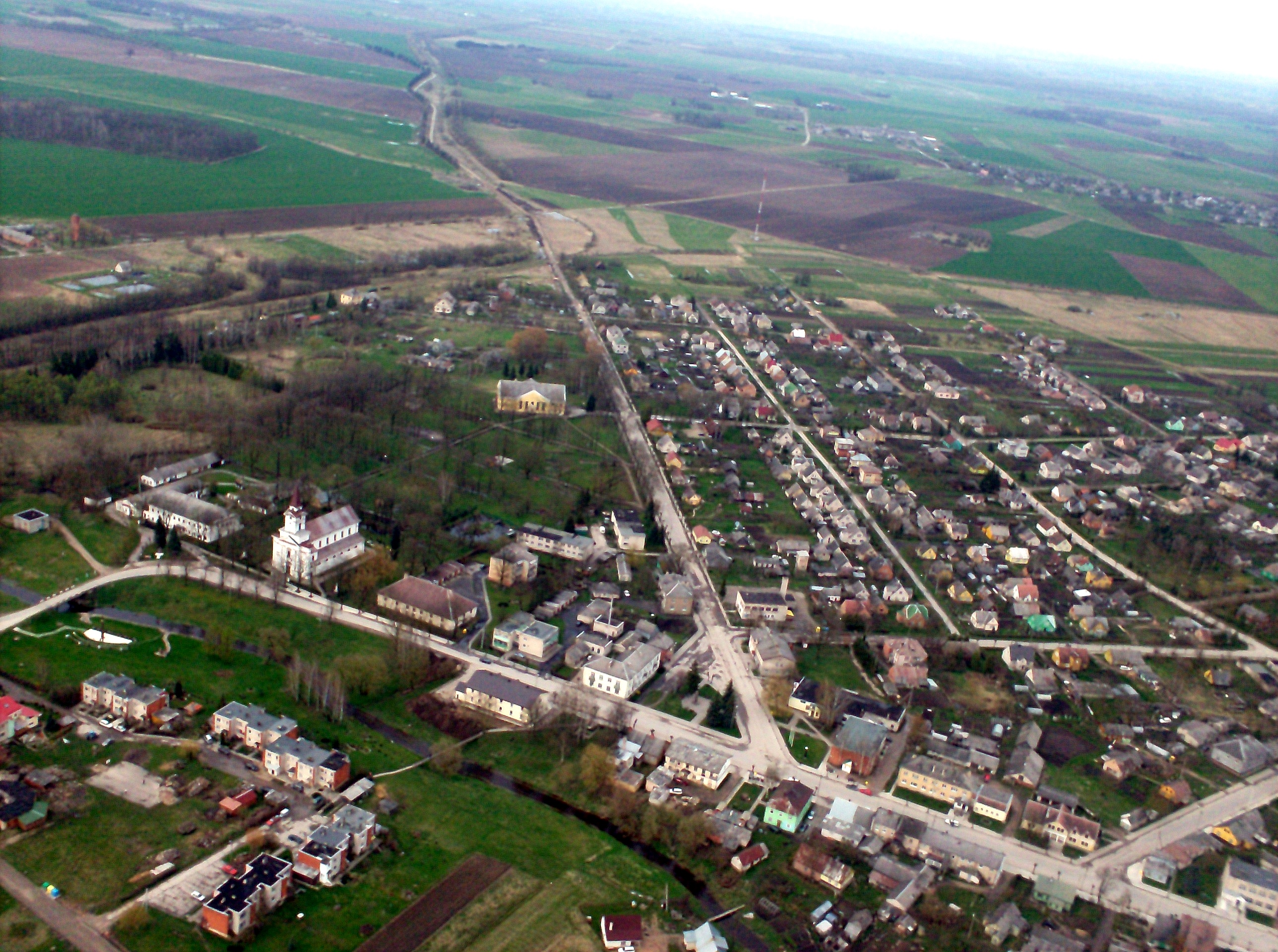 Город Йонишкелис.